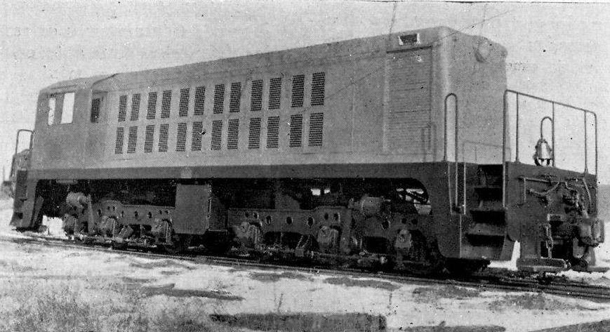 Baldwin-Whitcomb End-Cab compradas pela RVC e VFFLB